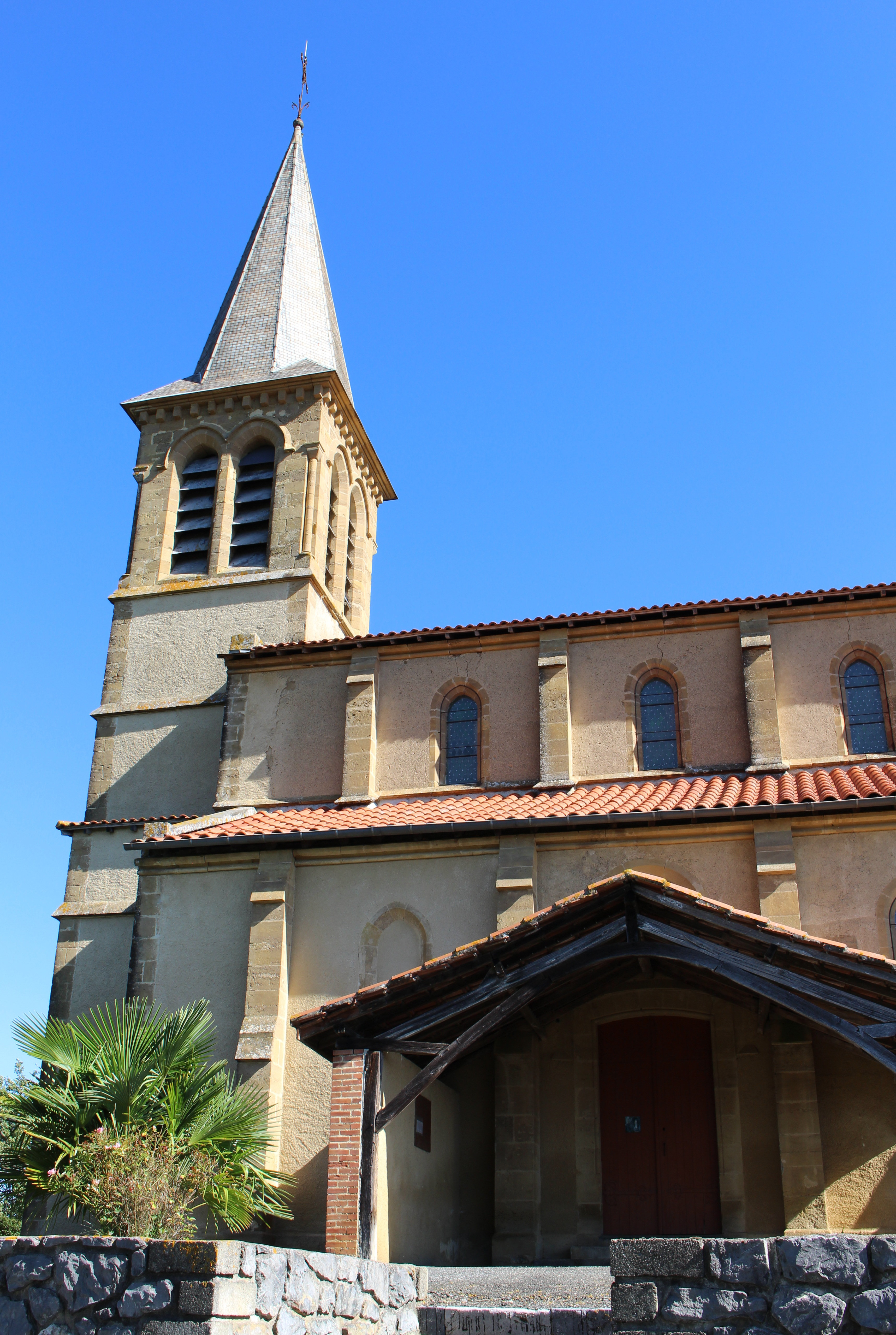 Église de l'Assomption de Larroque (Hautes-Pyrénées)